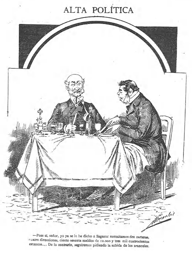 Alta política, por «Mecachis»